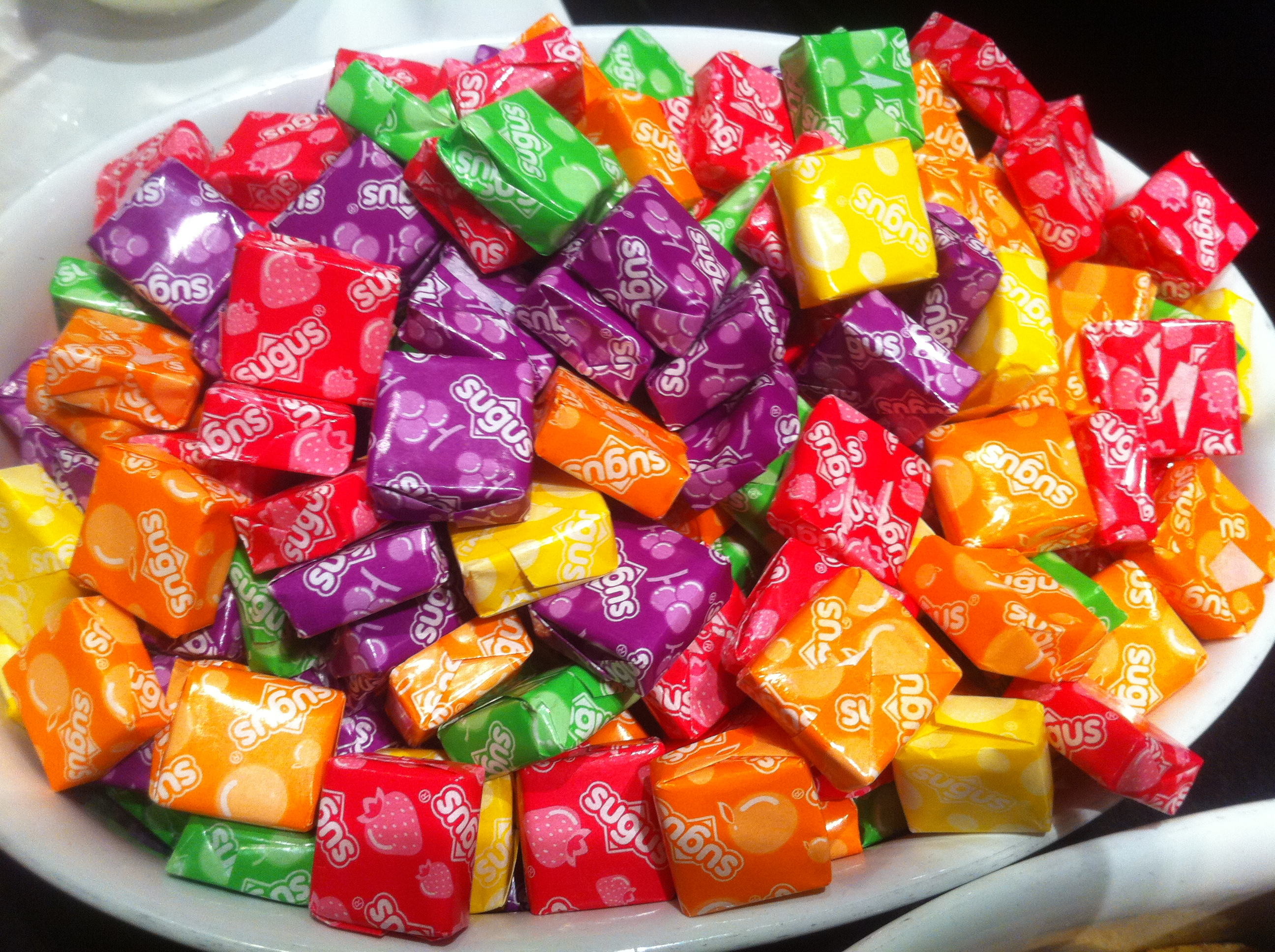 中文（香港）: 香港怡東酒店 自助餐 食品 瑞士糖